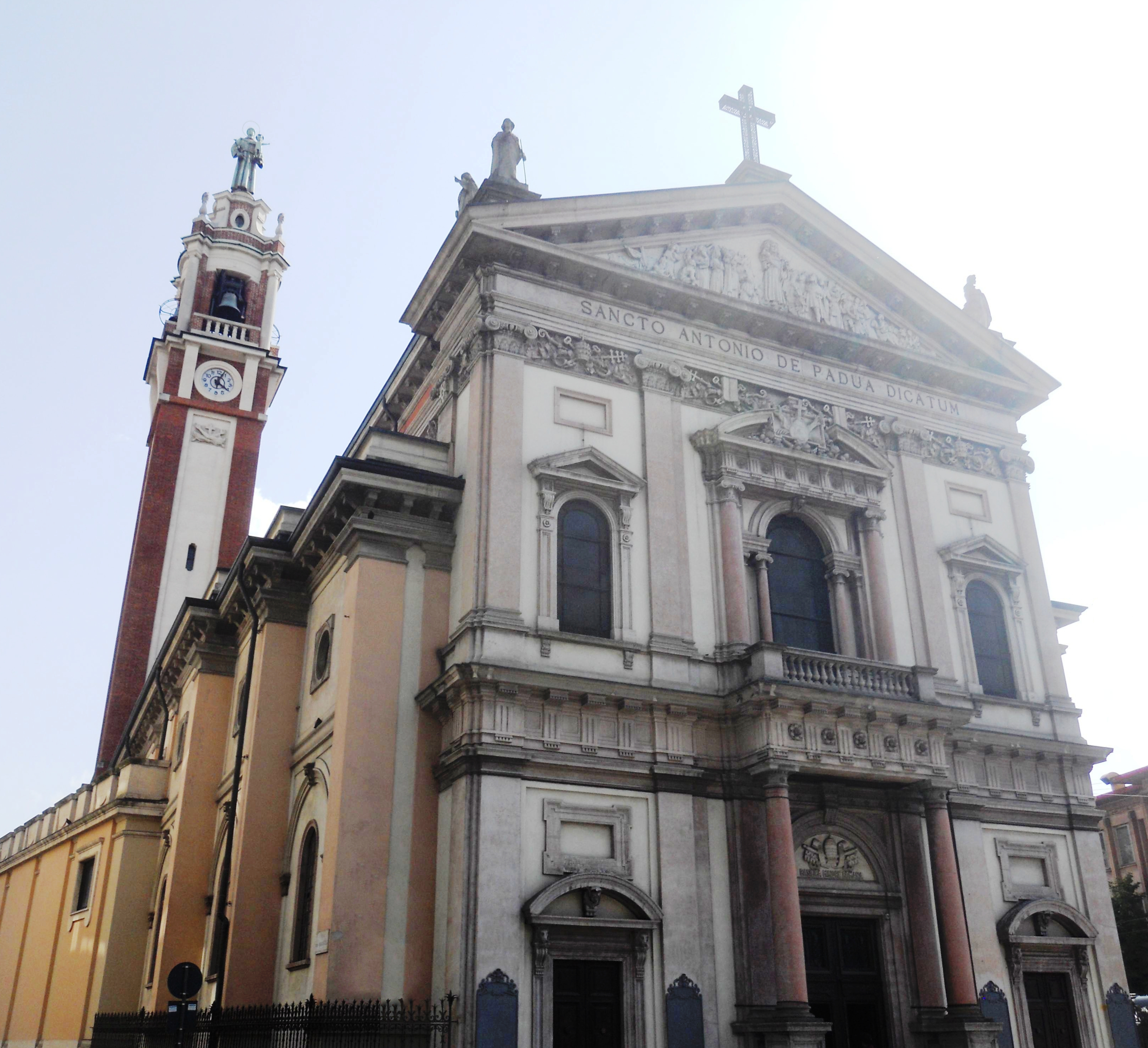 Esterno della chiesa di Sant'Antonio di Padova a Milano